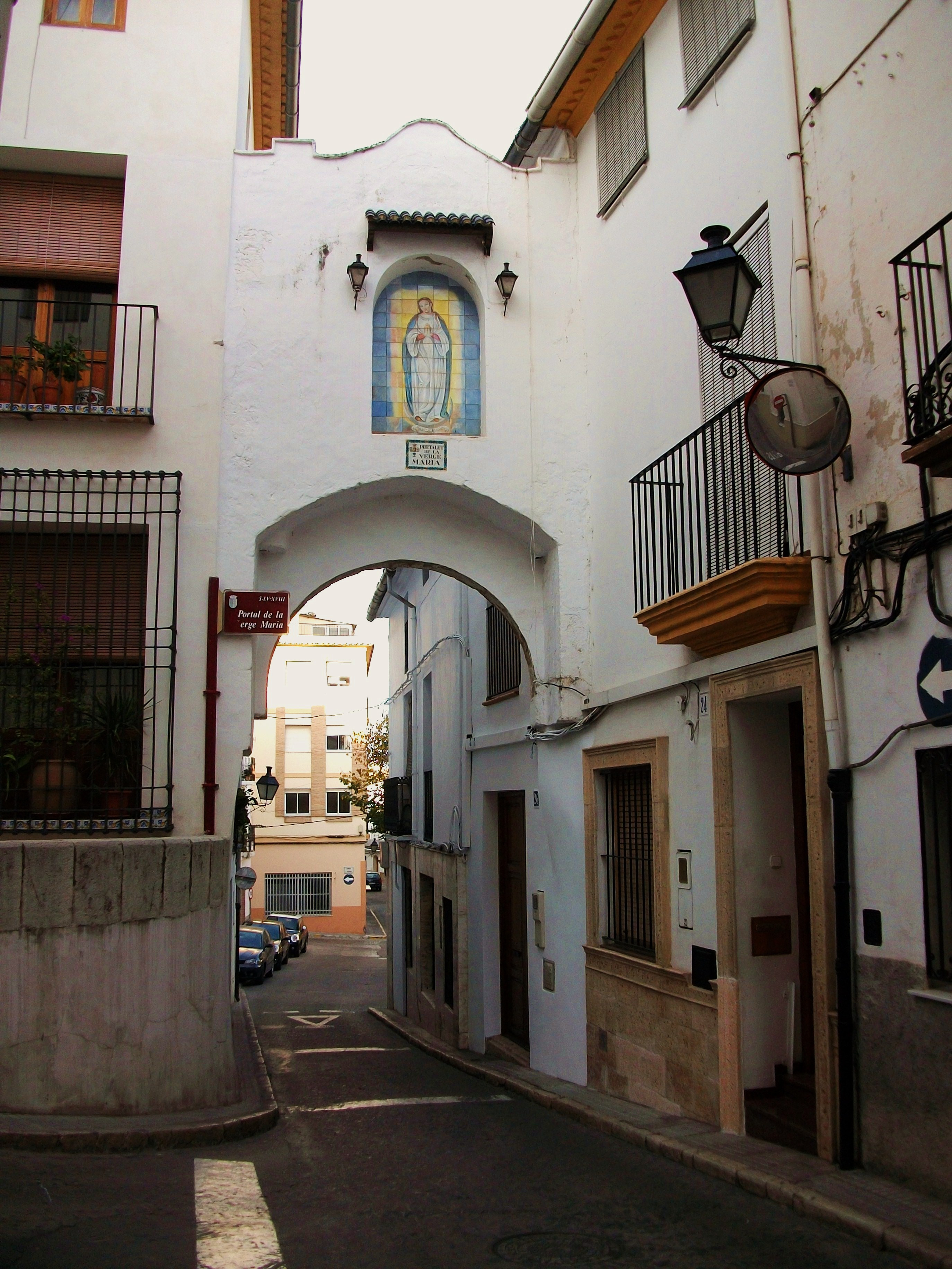 Portal de la Verge Maria d'Oliva, la Safor, País Valencià.